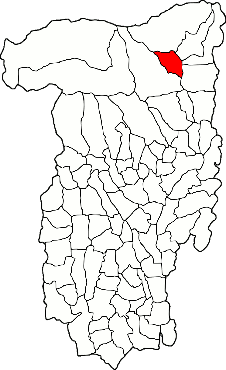 Lage der Gemeinde Racovița im Kreis Vâlcea (RO).